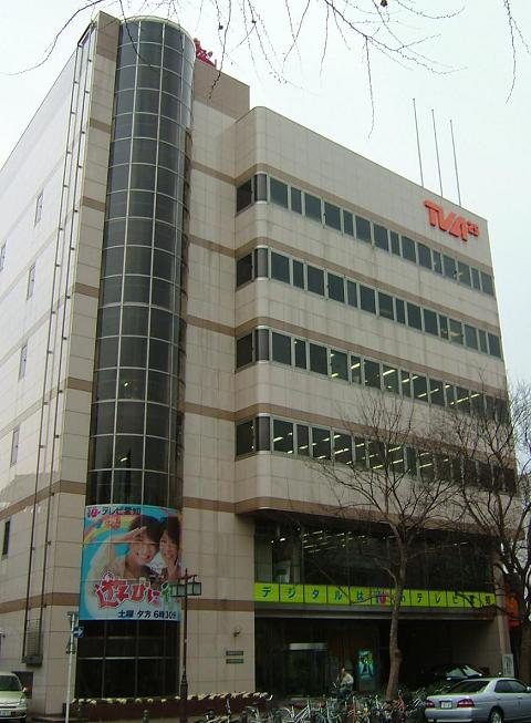 名古屋市中区大須に所在するテレビ愛知本社社屋。このビルは自社ビルではなく「日経電波会館名古屋ビル」であり、テレビ愛知は日本経済新聞社に家賃を払っている。この形態はキー局であるテレビ東京（「日経電波会館」）と同じである。